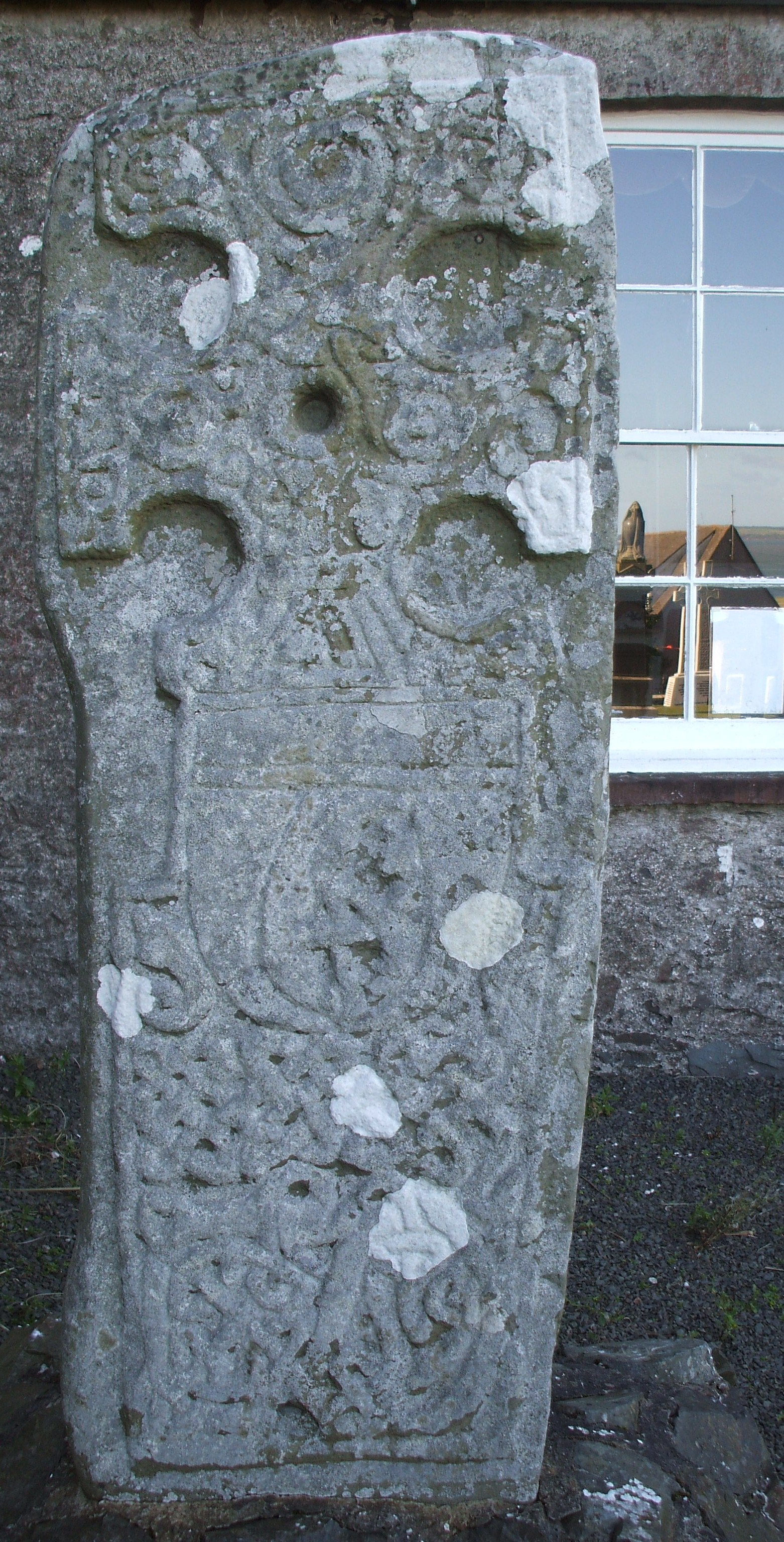 Der sog. Kilmorie Stone in Kirkcolm, Dumfries and Galloway, Schottland